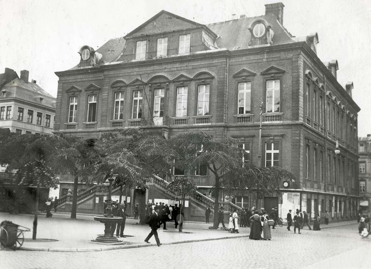 La Violette en 1914